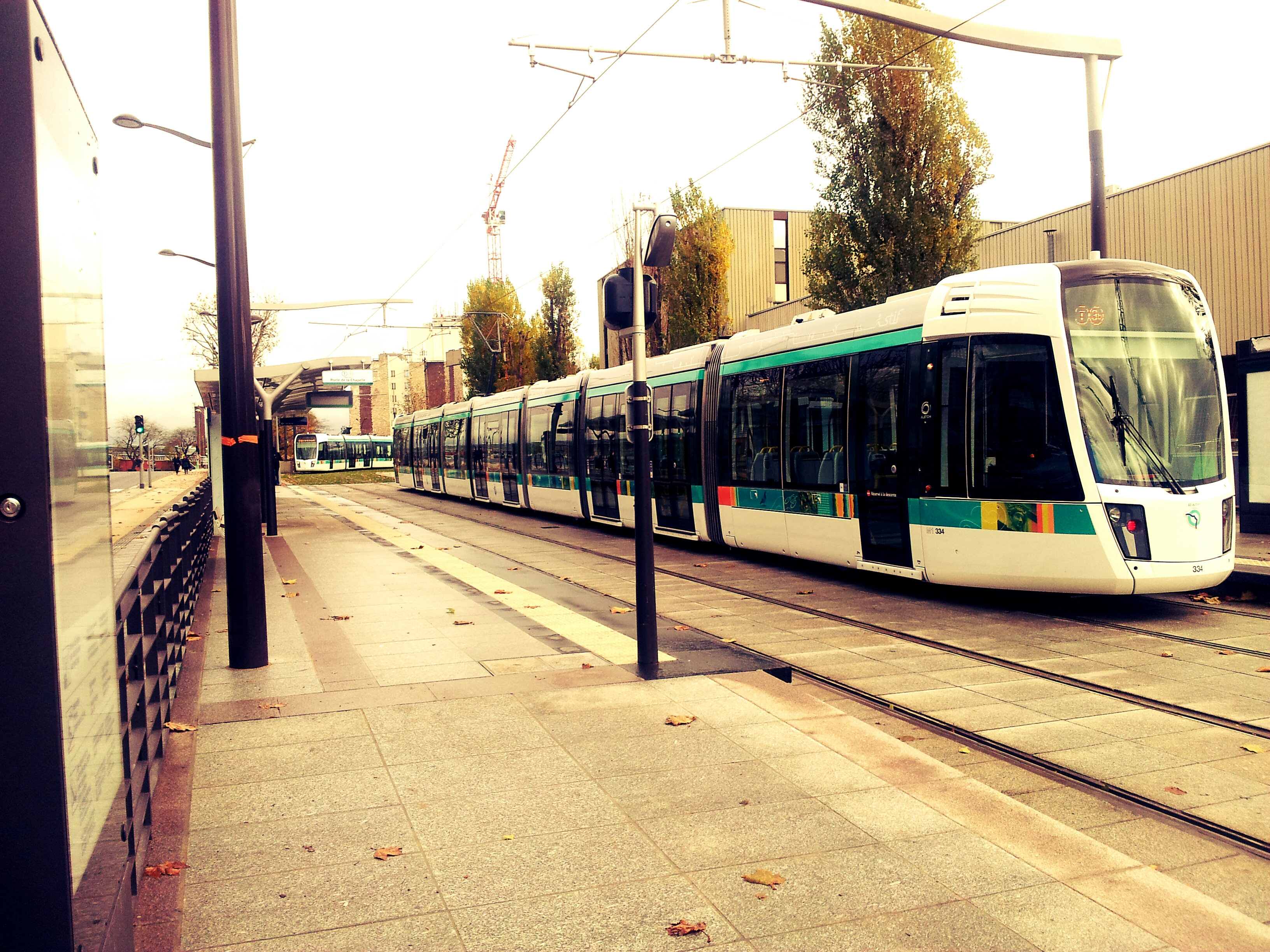 Une rame du T3b en marche à blanc stationne à Canal Saint-Denis. Une autre rame en direction de porte de la Chapelle est bloquée à un feu vertical en amont. (742P1648a)